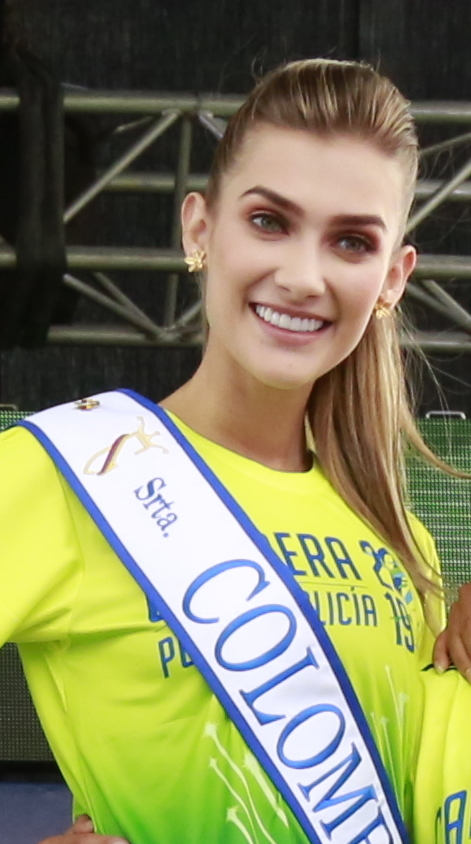 Carrera por la Policía 10k 2019 - Señorita Colombia 2019